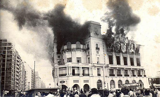 Vista desde la Playa Bristol del incendio del edificio del Club Mar del Plata.